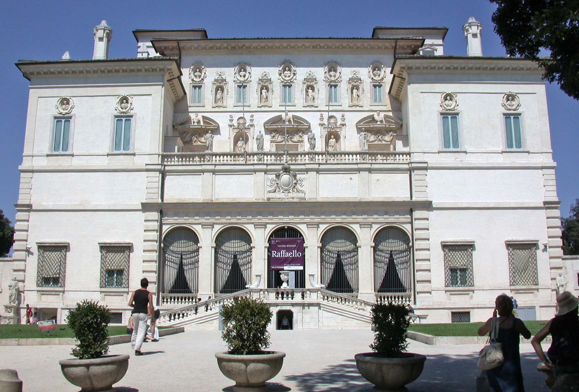 Roma, Villa Borghese, Galleria Borghese, facciata.